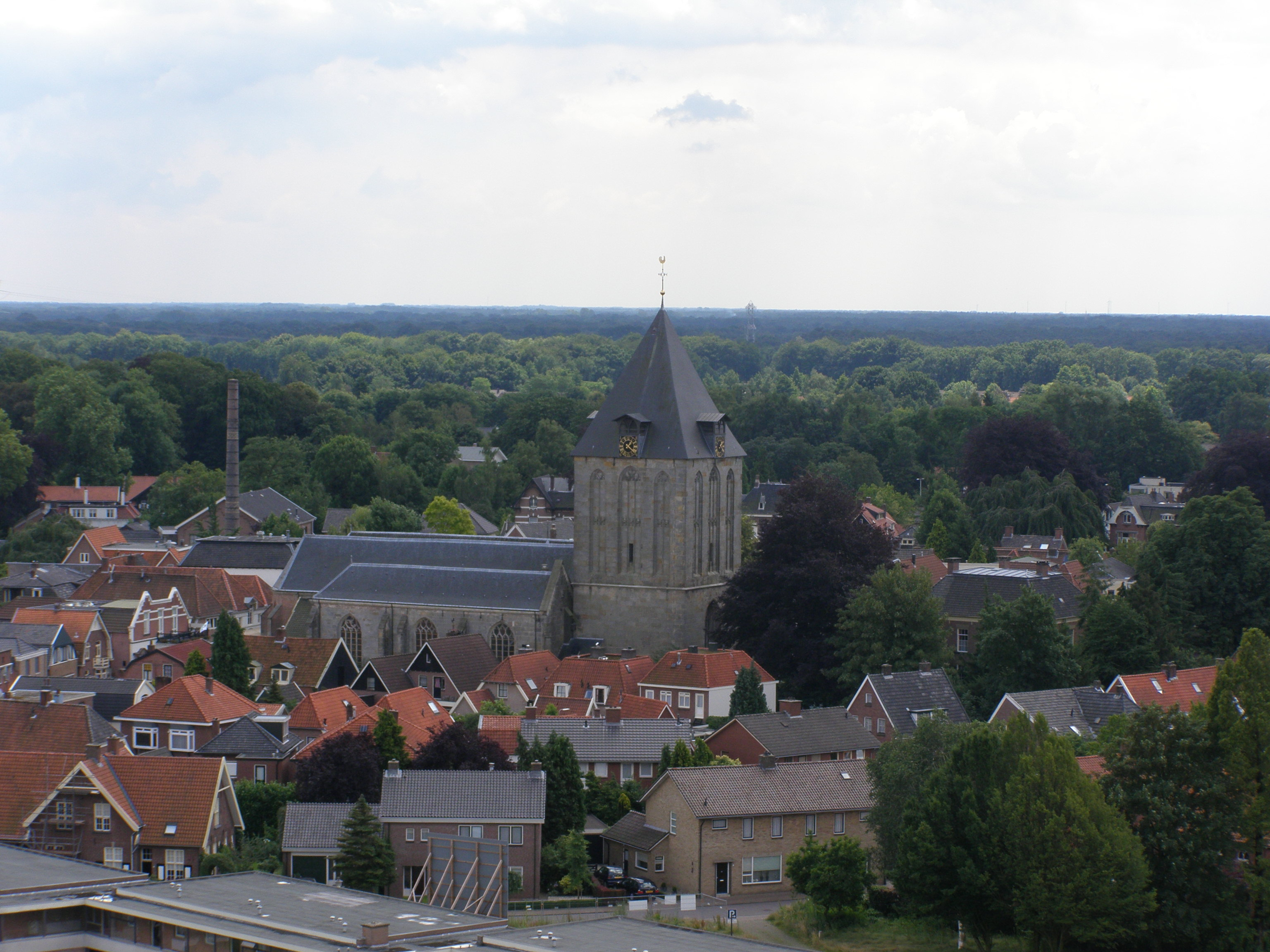 eigen werk